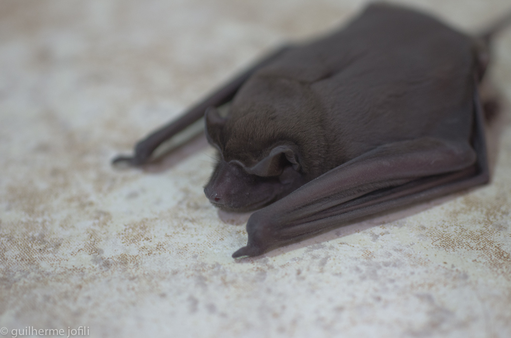 Molossus molossus tropidorhynchus?